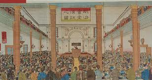 錦絵「明治会堂之図」（松斎吟光画）慶應義塾演説会場、後専修学校校舎。